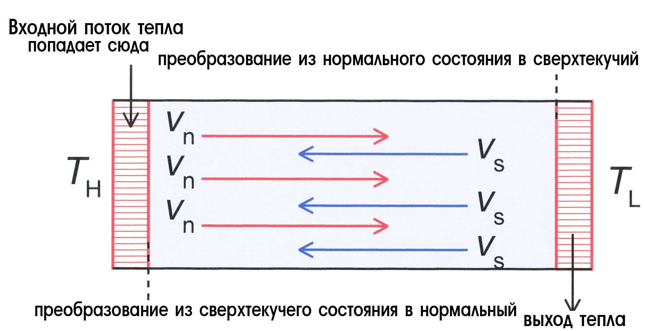 Counterflow heat exchange 01